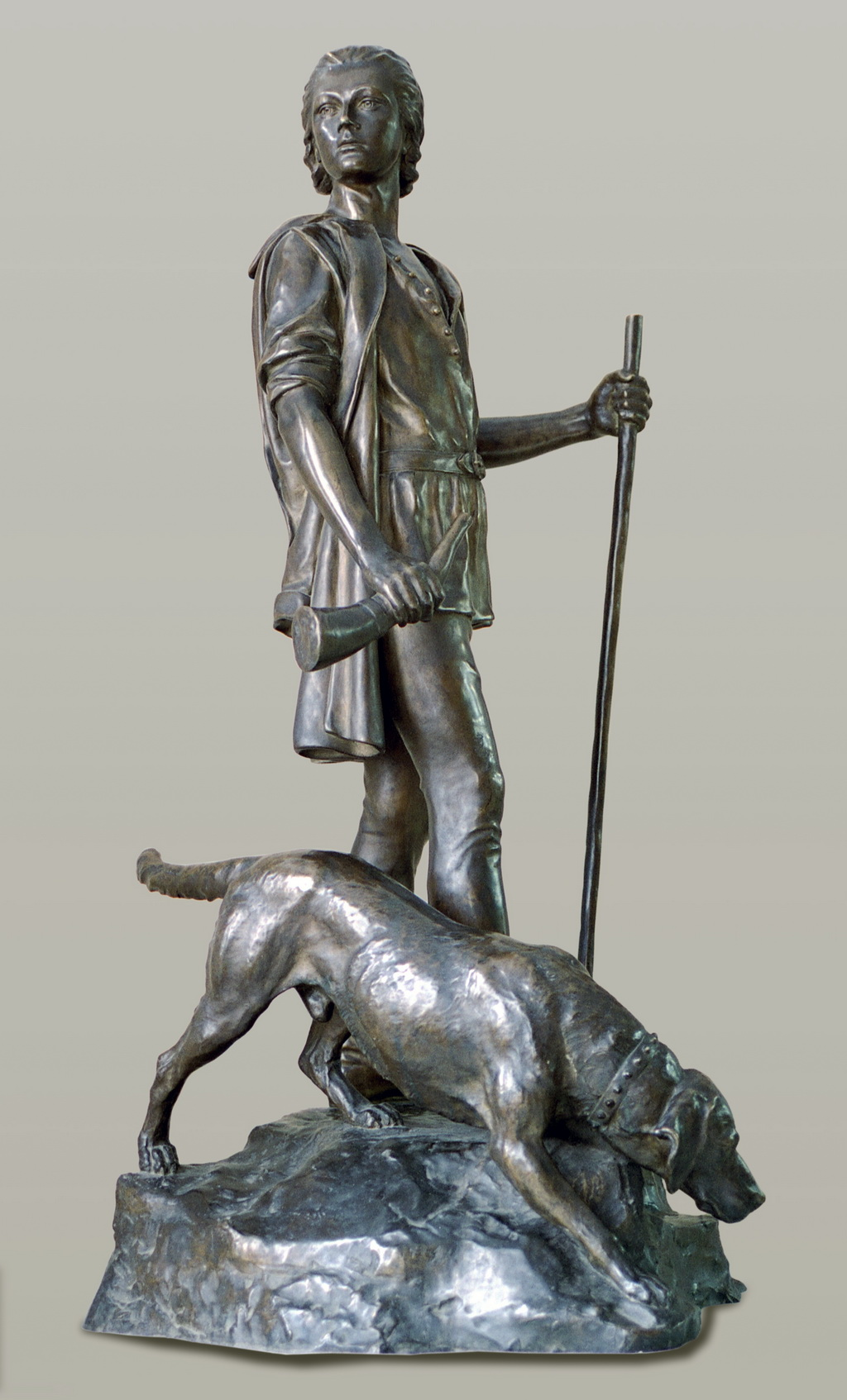 Mátyás király korabeli apród szobra (1939), Tapolca, Városi Múzeum